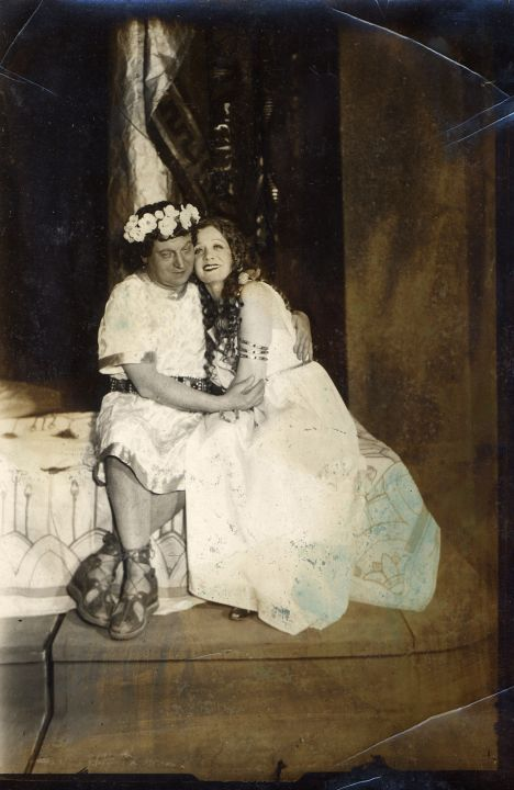 Madách Imre: Az ember tragédiája. Nemzeti Színház. Rendező: Horváth Árpád; Szereplők: Ádám: Abonyi Géza, Éva: Tasnádi Ilona